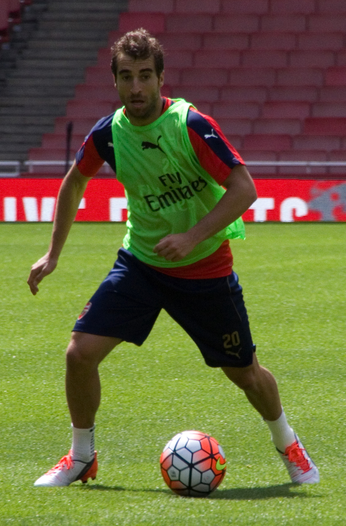 Mathieu Flamini during 2015 Arsenal Members Day.